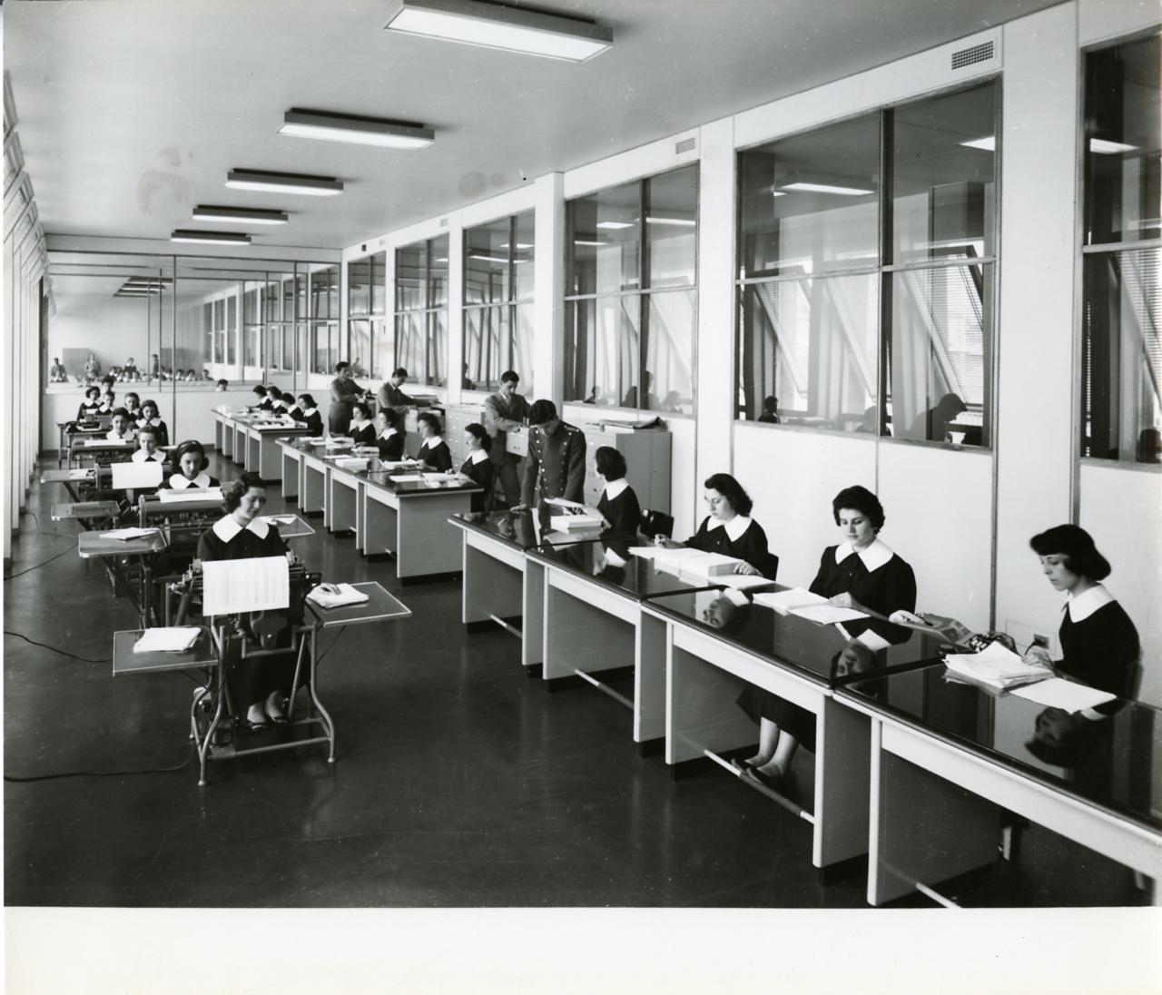 Servizio fotografico : Milano, 1960 / Paolo Monti, Istituto di fotografia Paolo Monti. - Stampe: 3 : Positivo b/n, gelatina bromuro d'argento/ carta, 24x30. - ((Sul coperchio della scatola, manoscritto a pennarello: "Milano Navigli".